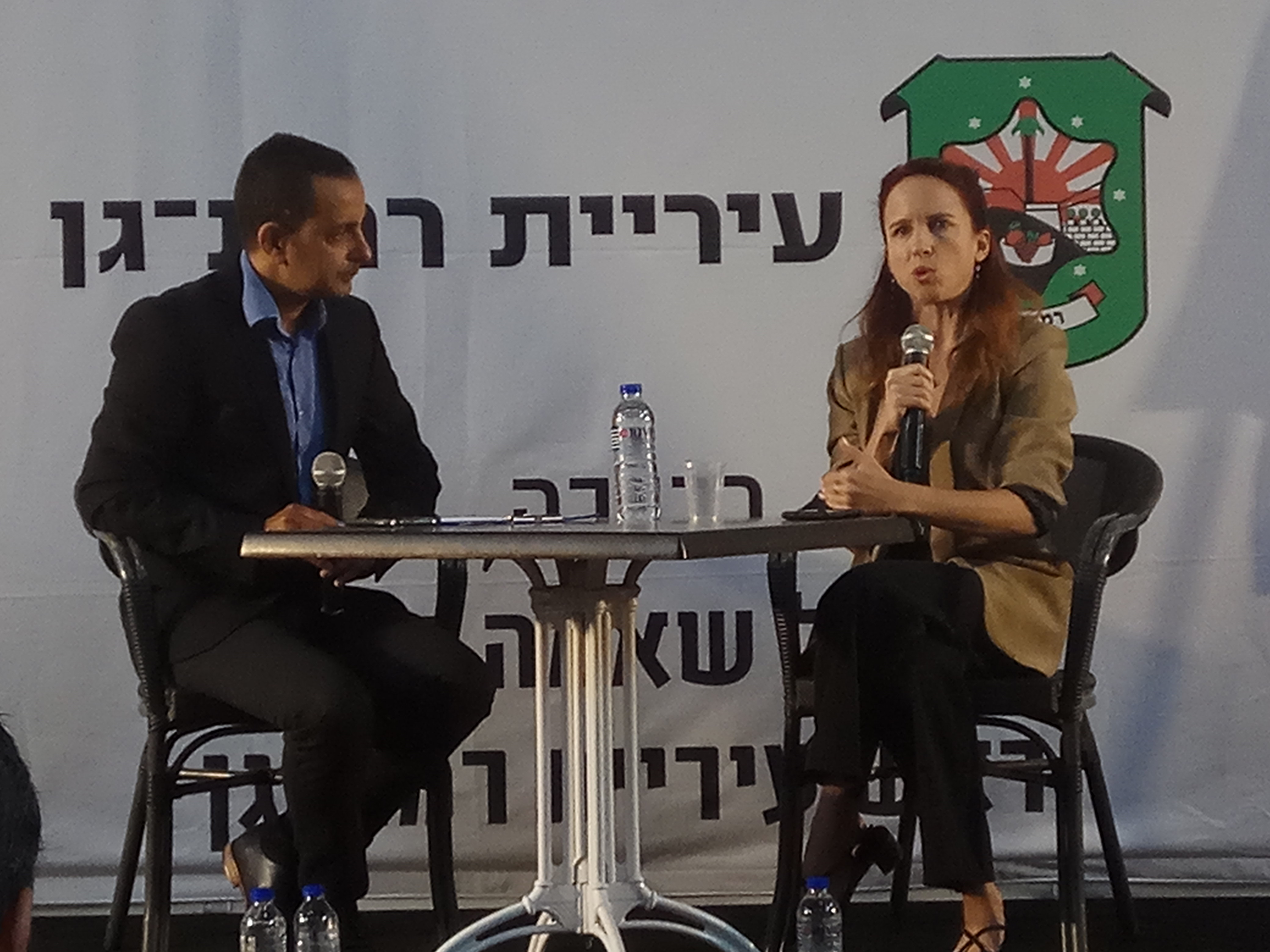 סתיו שפיר באירוע שבתרבות ברמת גן עם העיתונאי יובל קרני